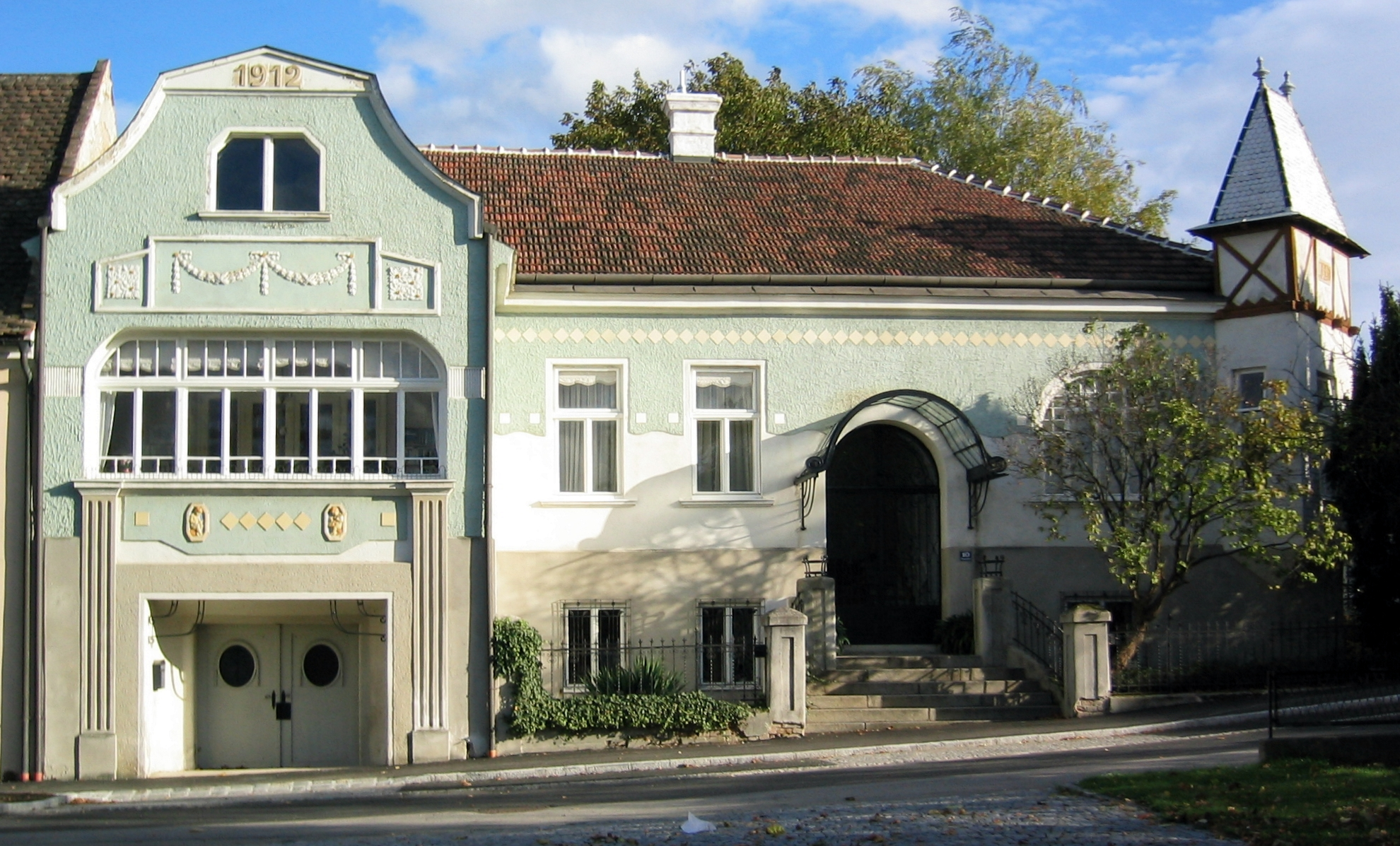 Sitzendorf - Hauptplatz 10